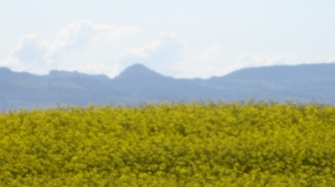 Lewiner Bergland (Wzgórza Lewińskie), Hummelberg (733 m, polnisch Gomoła), Standort der Ruine der Hummelburg (Zamek Homole) bei Hummelwitz (Zielone) zwischen Lewin (Lewin Kłodzki) und Bad Reinerz (Duszniky Zdrój), Niederschlesien, Polen.